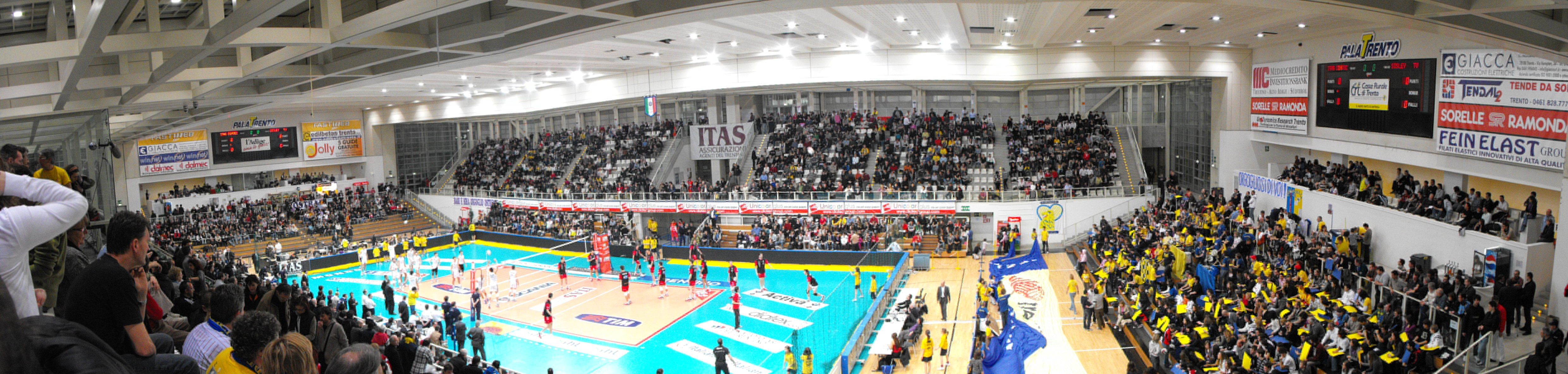 Partita di campionato tra Trento e Treviso